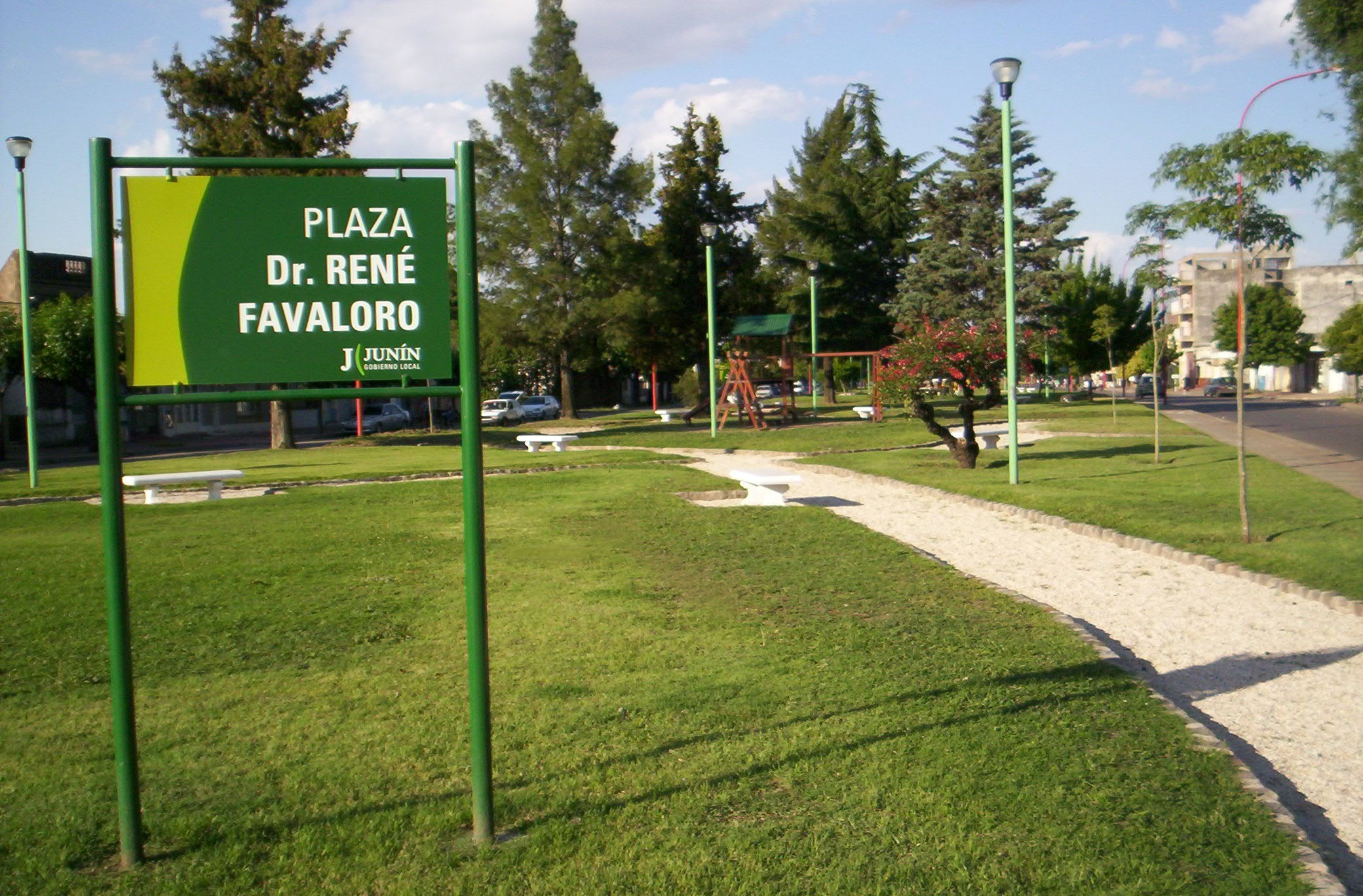 Plaza René Favaloro en Junín, Argentina.